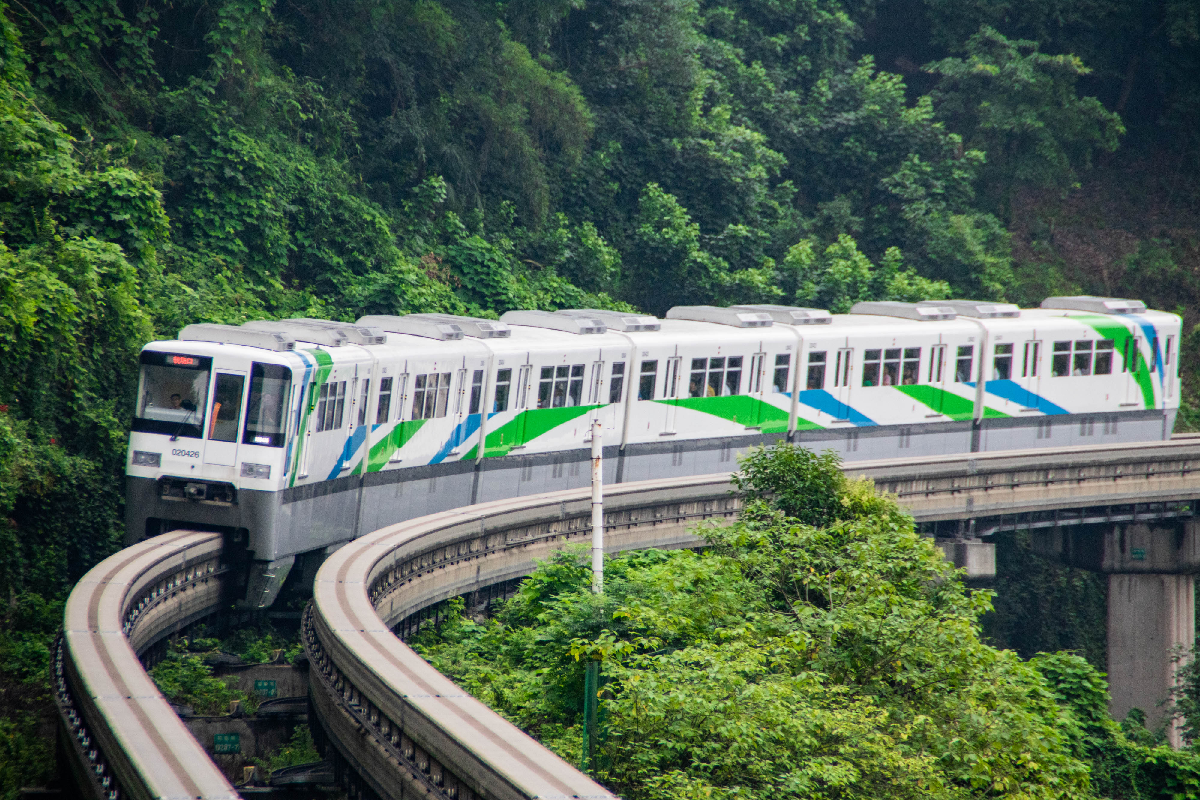 中文（中国大陆）: 重庆轨道交通2号线